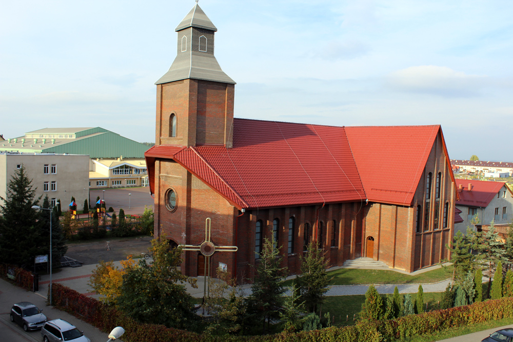 Kościół parafialny Świętego Brata Alberta Chmielowskiego w Świebodzicach